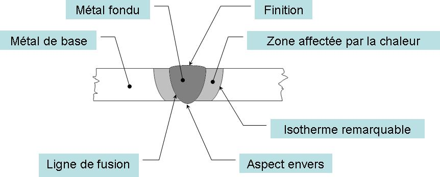 Joint soudé - Welded joint